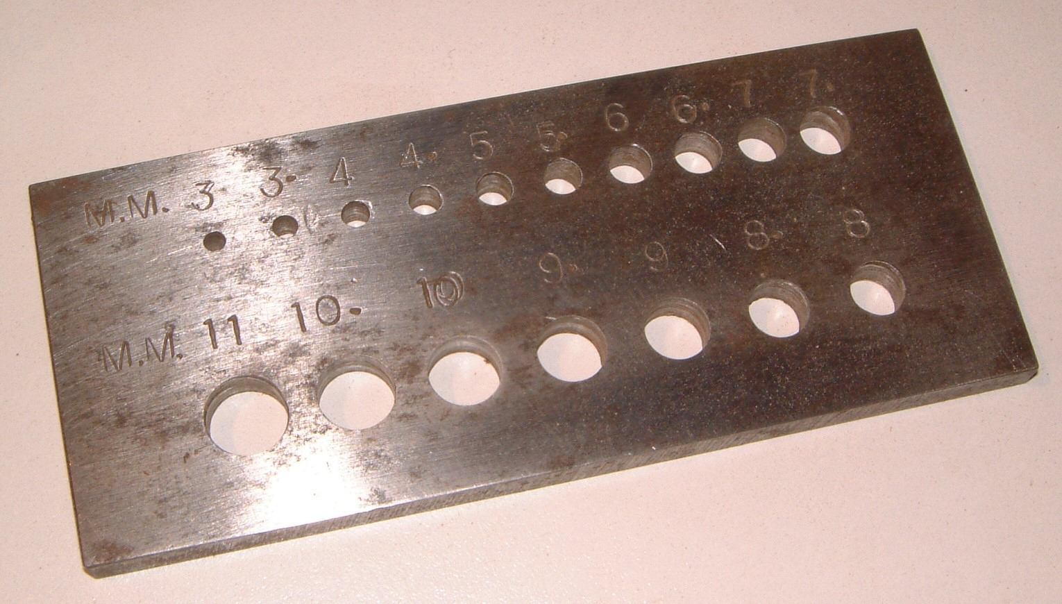 dowel making template